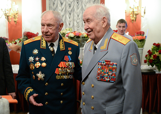 90-летие маршала СССР Дмитрия Тимофеевича Язова.